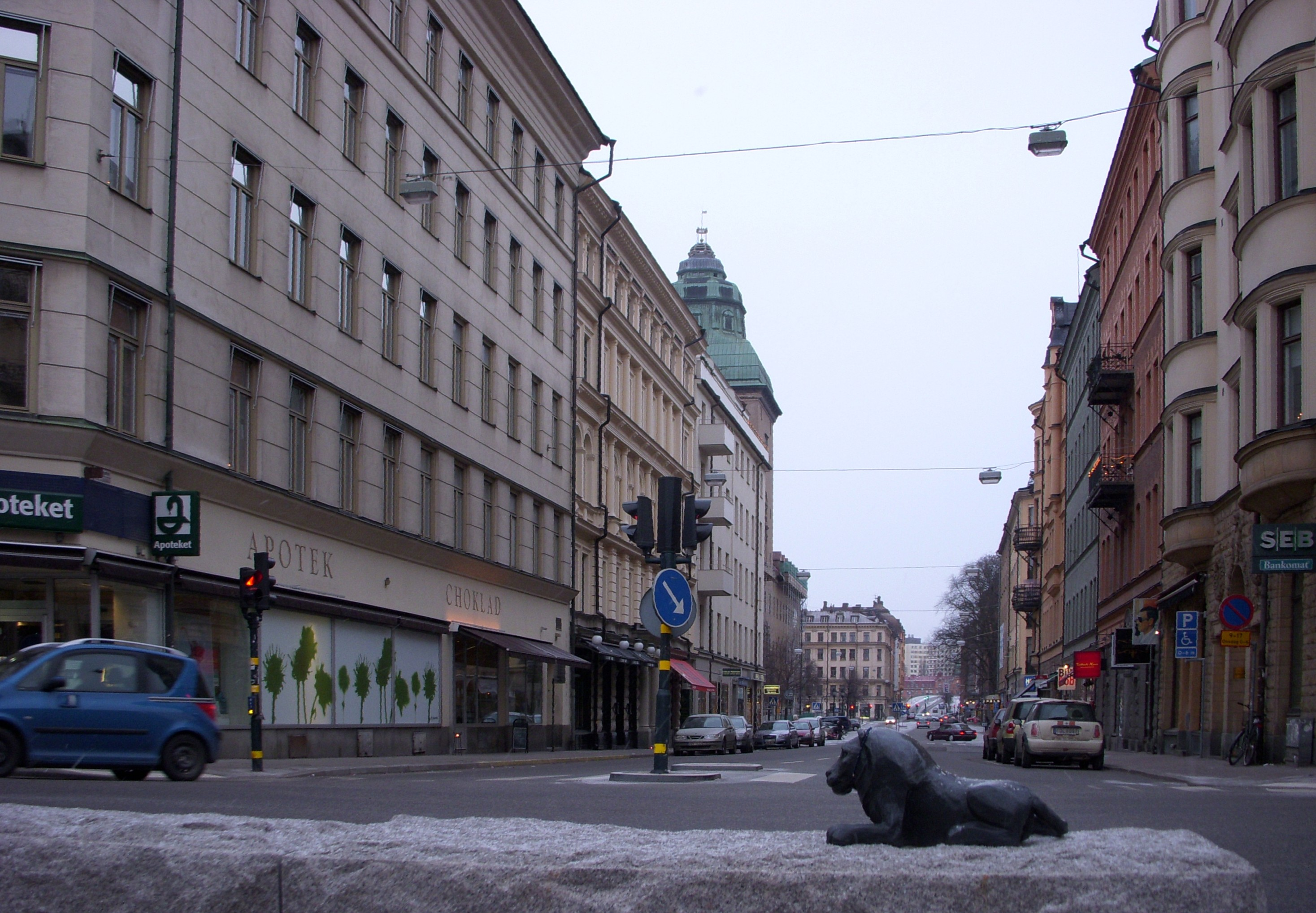 Scheelegatan i Stockholm, vy mot norr från Hantverkargatan